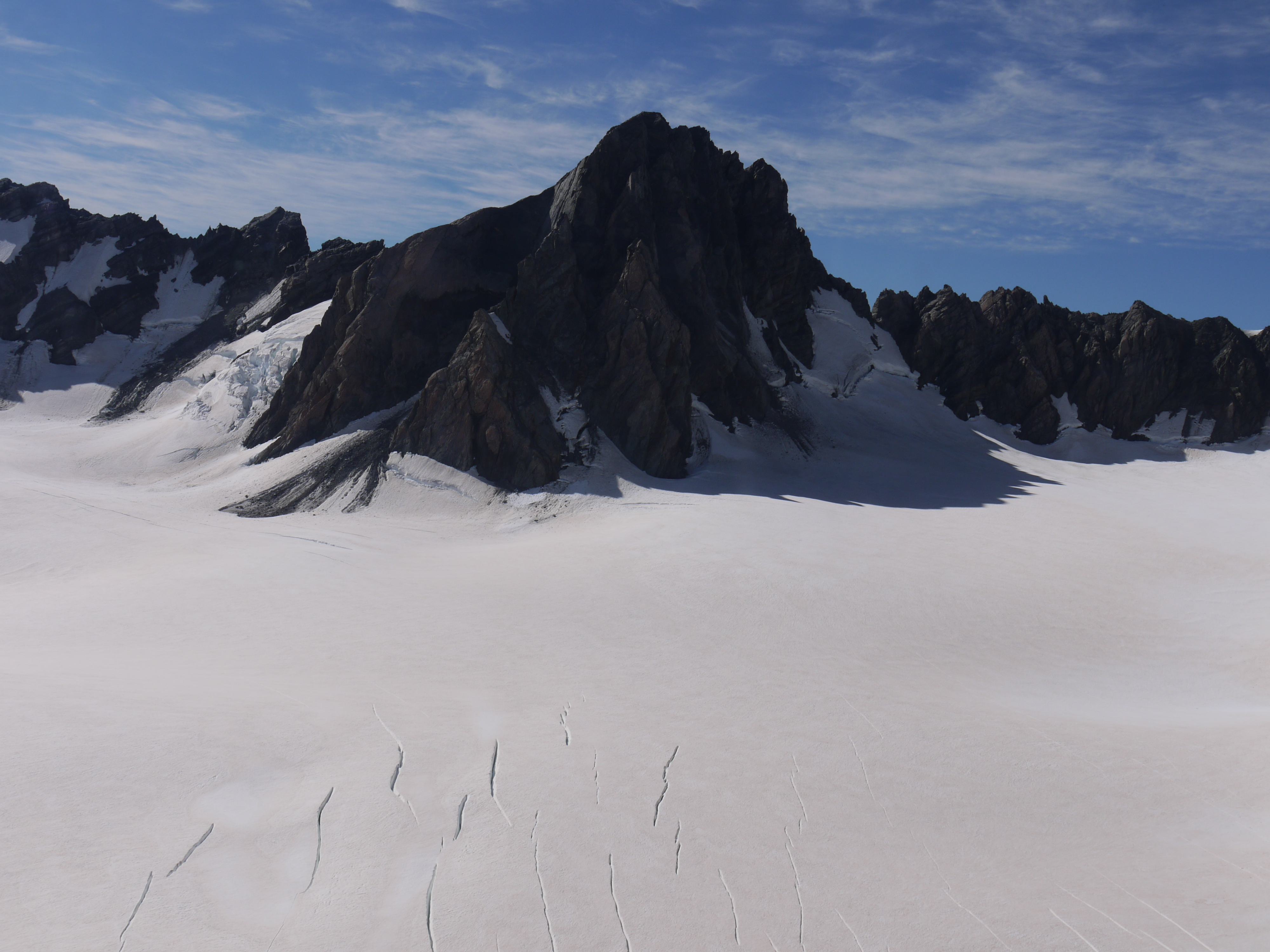 De Franz Josef Glacier, genomen vanuit een helikopter.